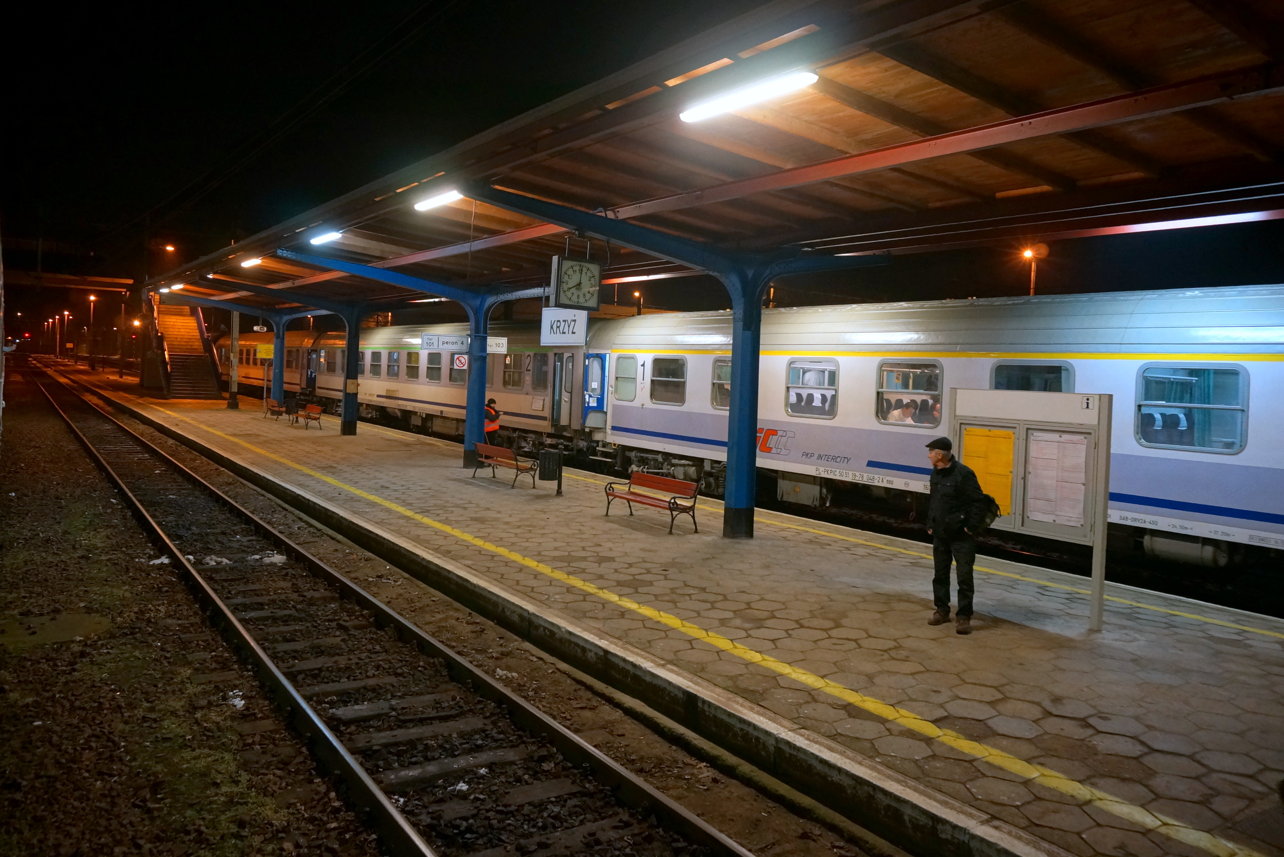 Stacja kolejowa w Krzyżu. Pociąg PKP Intercity na peronie 4. Krzyż jest najmniejszym miastem w Polsce w którym zatrzymują się pociągi ekspresowe